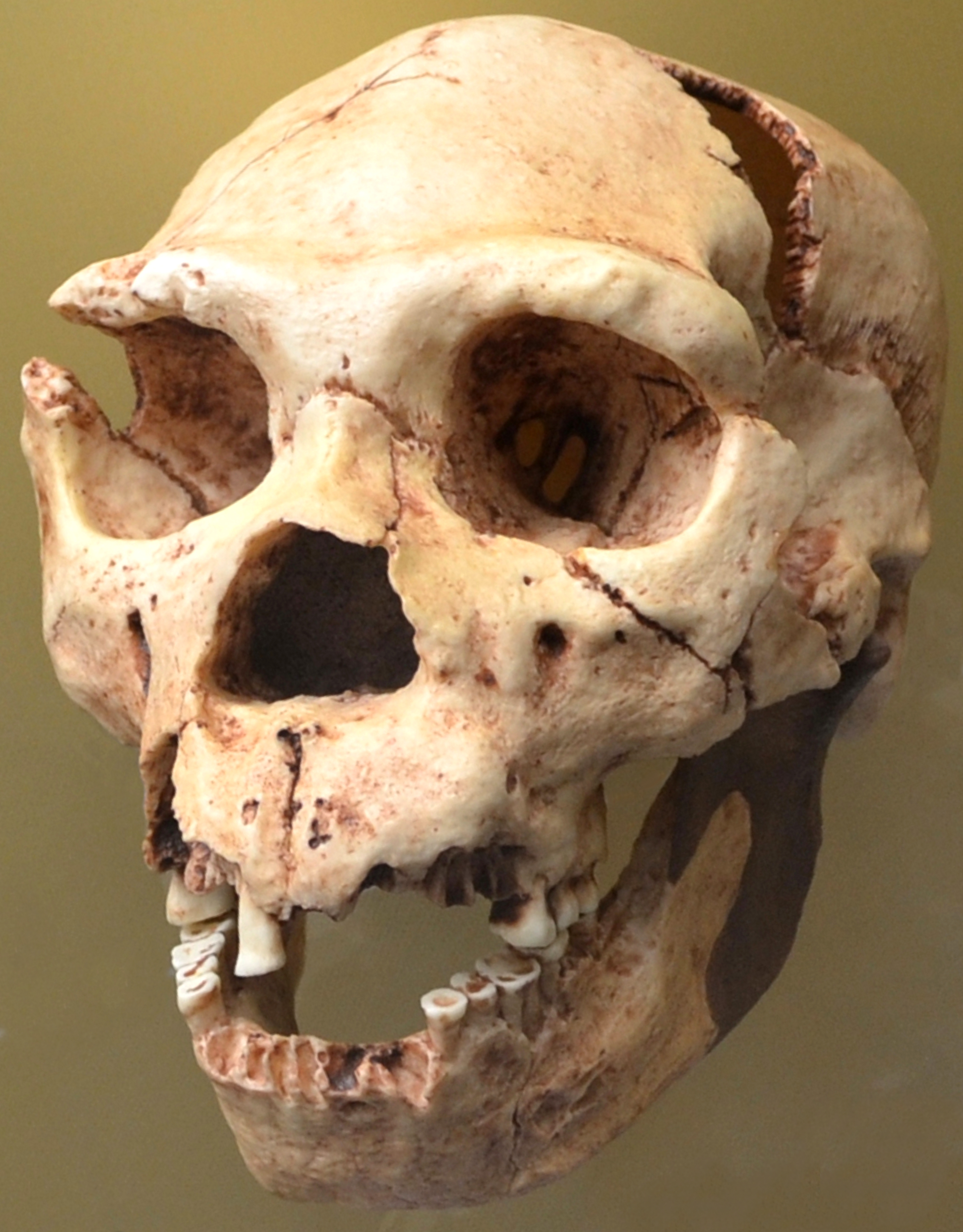 Homo heidelbergensis.300.000-200.000 años. Museo de Prehistoria de Valencia.